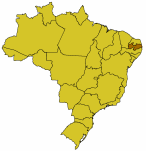 Karte Brasiliens, Paraíba hervorgehoben, GFDL nach der Vorlage Bild:Brasilien Bundesstaaten.png